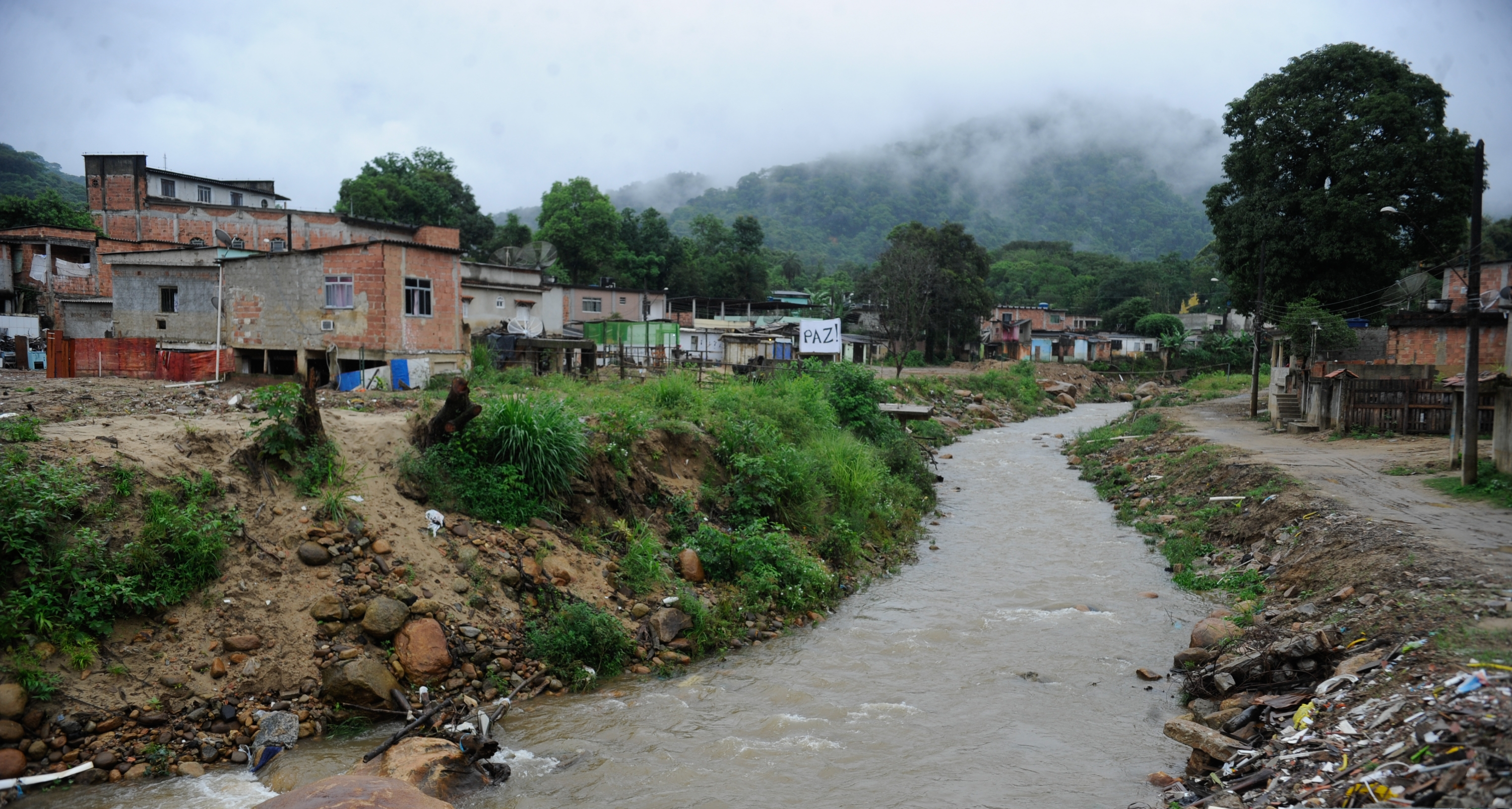 Rio de Janeiro – Oito municípios estão em estado de atenção por causa da chuva que atinge o estado desde o dia 24. O Rio Capivari, que corta os municípios de Duque de Caxias e Belford Roxo, ambos na Baixada Fluminense, está com o nível de água acima da média.